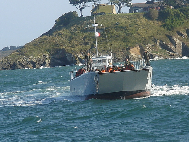 Barge de débarquement du régiment de marsouins de Vannes, doublant la pointe de Ramonette, en sortant de Le Palais à Belle-Île-en-Mer (56)